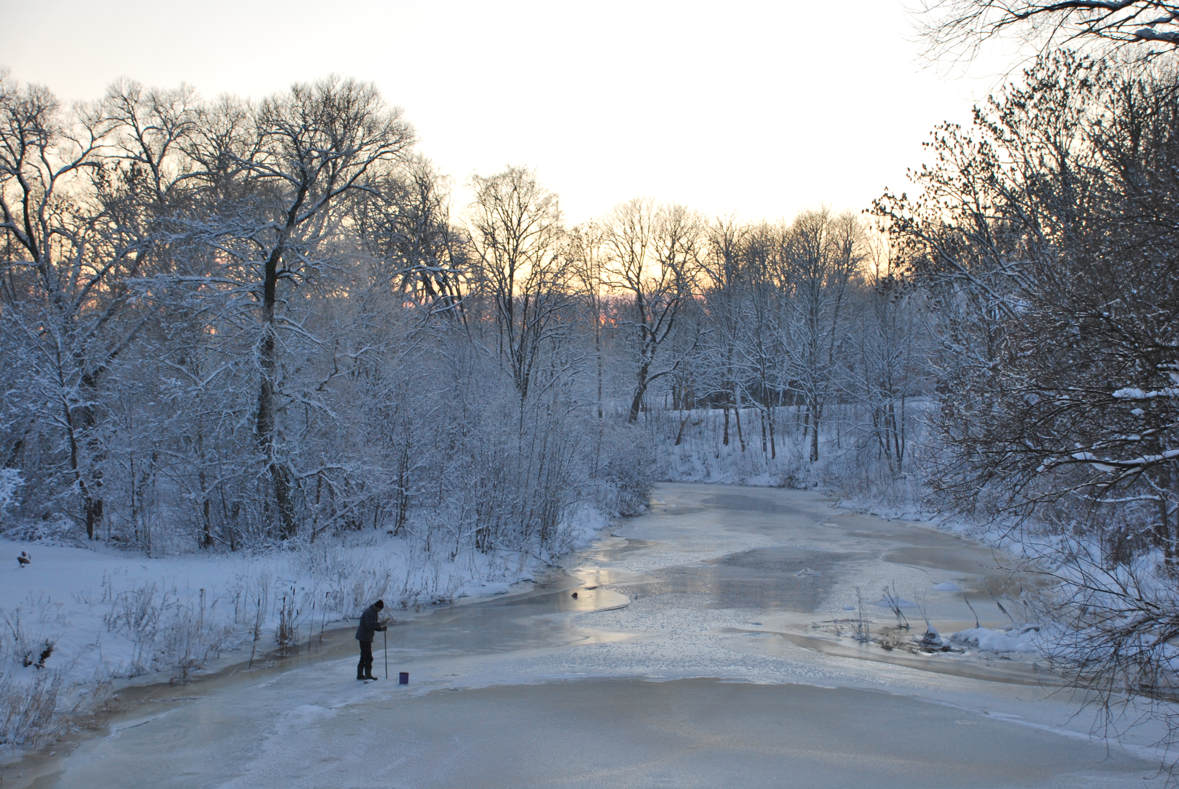 Ezere River (Latvia)